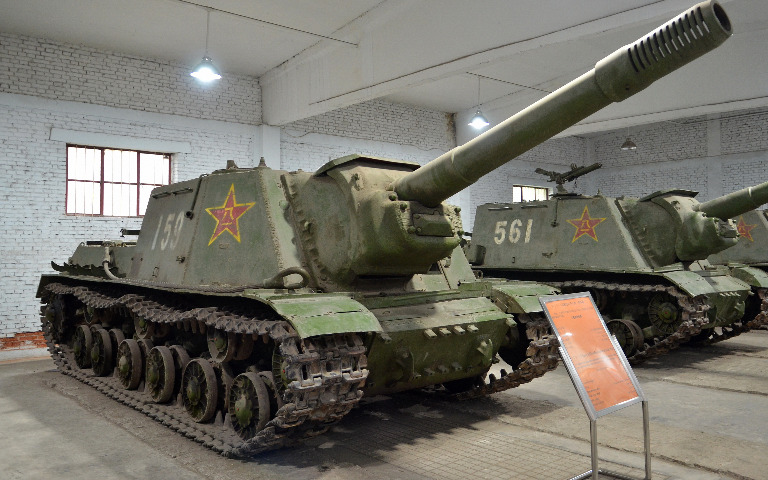 保存在中国人民解放军坦克博物馆的苏制ISU-152自行火炮